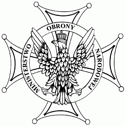 Ministerstwo Obrony Narodowej – odznaka okolicznościowa – 2012, Polska.